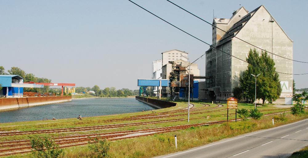 Der Alberner Hafen im 11. Wiener Gemeindebezirk Simmering ist einer der Häfen in Wien.